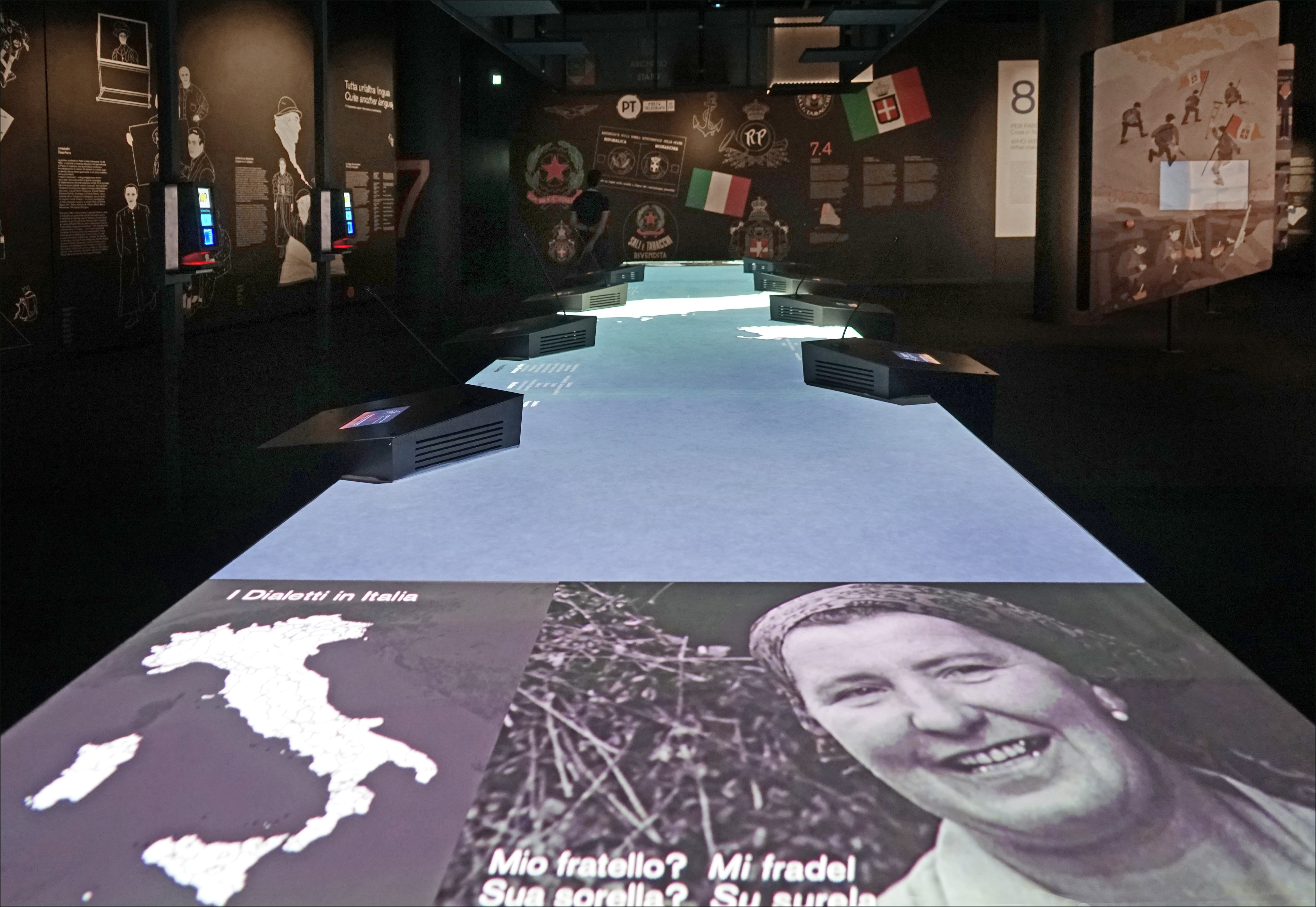 Table interactive, sonore et visuelle permettant de découvrir les dialectes italiens en écoutant des phrases simples. Le dispositif propose également un jeu de type quiz autour des prononciations et des formes verbales utilisées dans les régions italiennes Le M9 a pour but explicite de "parcourir le passé (NDLR de l'Italie), comprendre le présent et imaginer le futur". C'est un musée de la civilisation italienne du 20è siècle, sans collection d'objets, dans lequel les thématiques sont traitées exclusivement de manière multimédia. Les dispositifs numériques interactifs y sont très nombreux, dans les salles des deux étages de l'exposition permanente (2610 m2), ce qui est très attractif pour un public jeune. Un troisième étage (1400 m2) est consacré aux expositions temporaires. Le bâtiment possède un auditorium - cinéma 4K de 200 places équipé de casques de réalité virtuelle, une boutique-librairie, un restaurant, de vastes espaces d'accueil du public. C'est un musée ultra-moderne, pièce maîtresse, d'un projet de rénovation urbaine du centre de Mestre, piloté par la "Fonzione di Venezia" et qui comprend également un centre commercial créé dans un ancien couvent, des magasins, des restaurants et cafés, animant le nouveau quartier. La partie permanente du musée M9 est organisée autour de 8 grands thématiques : 1. Démographie et structures sociales 2. Consommation, coutumes et modes de vie italiens. 3. Science, technologie, innovation 4. Économie, travail, production et bien-être 5. Paysages et agglomérations urbaines 6. L'État, les institutions, la politique 7. Éducation, formation et information 8. L'identité italienne. Les thématiques sur le site du M9